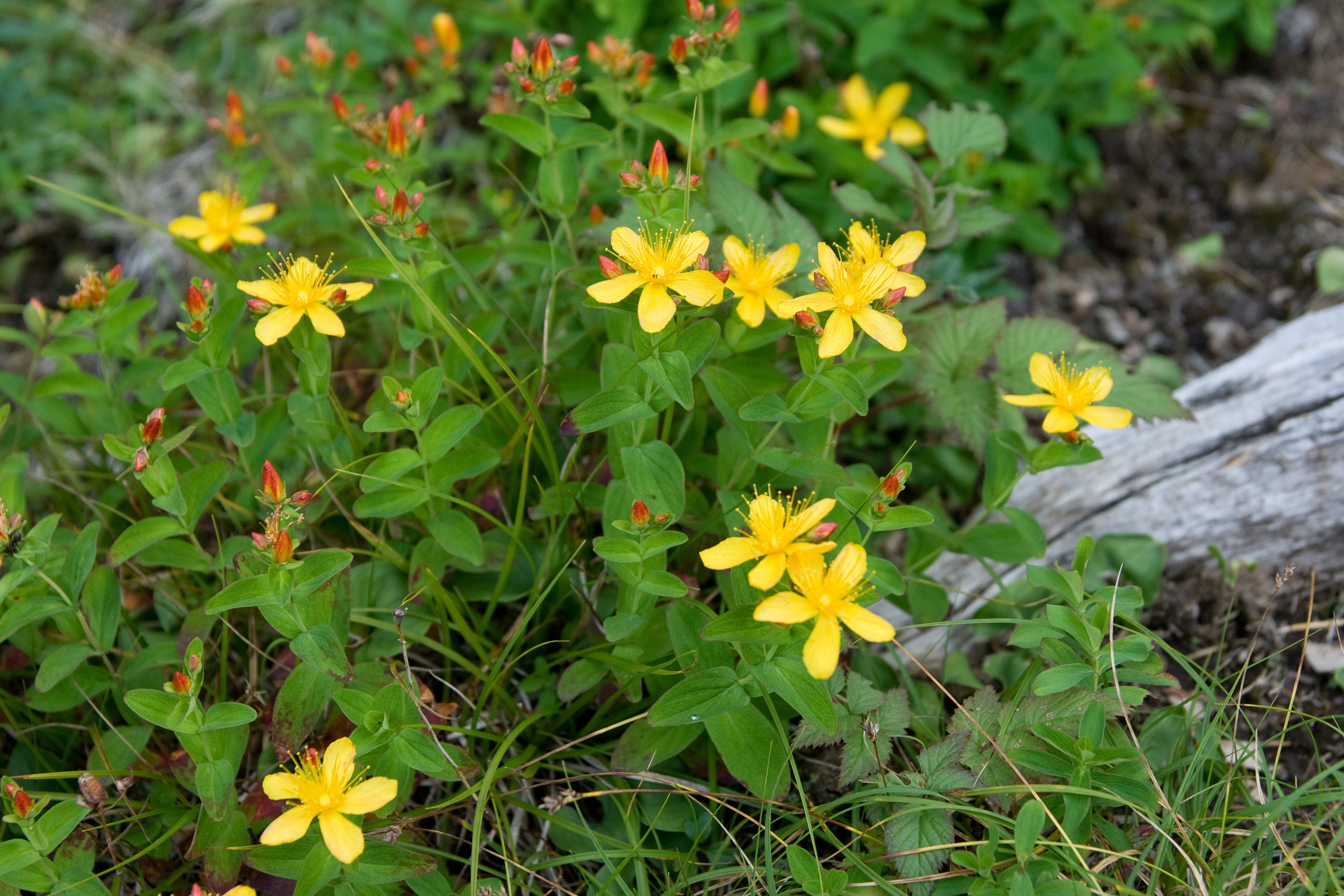 シナノオトギリ (学名:Hypericum kamtschaticum var. senanense)